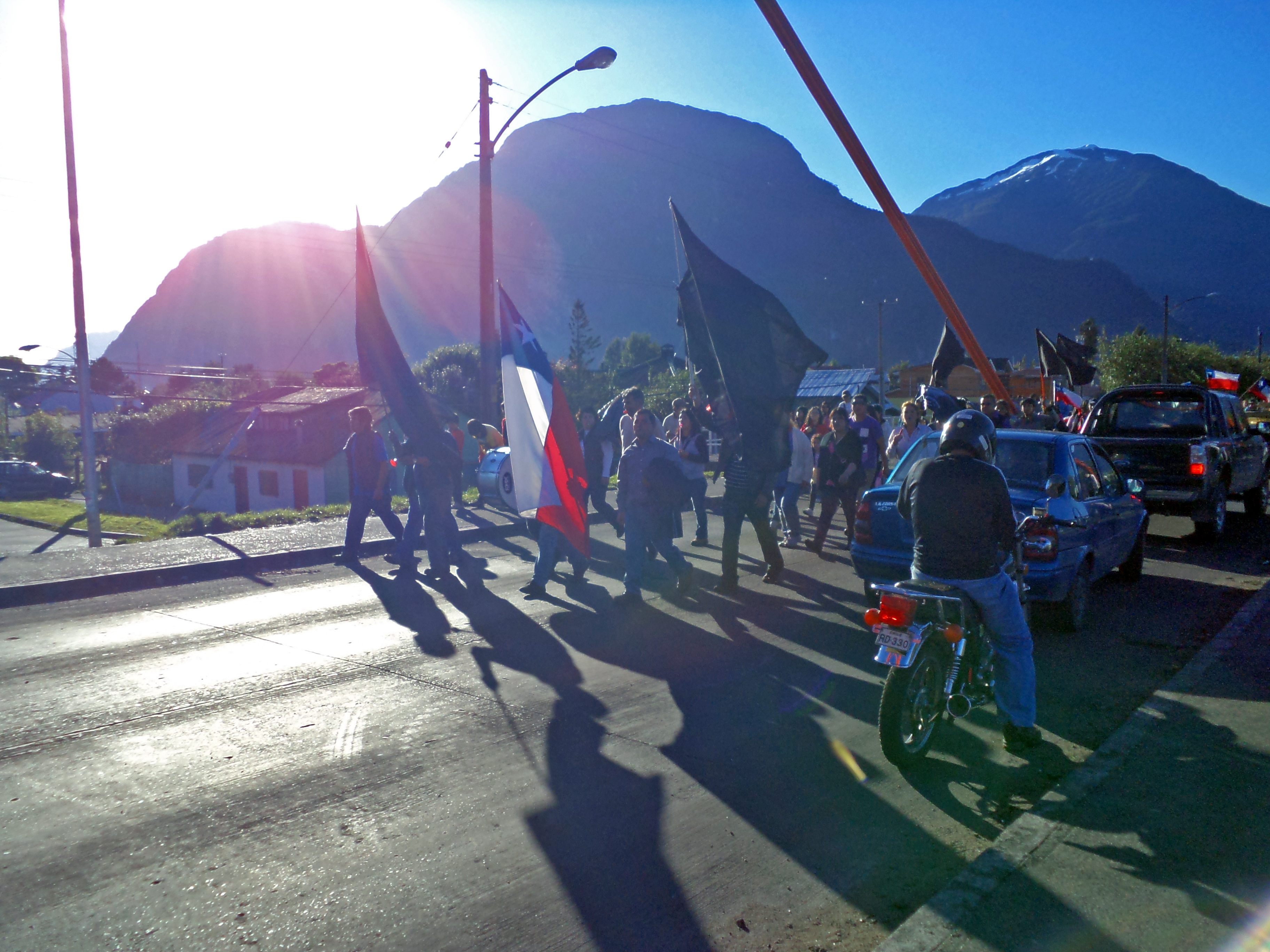 Protestas en el Puente Presidente Ibáñez en Puerto Aysén, Chile.